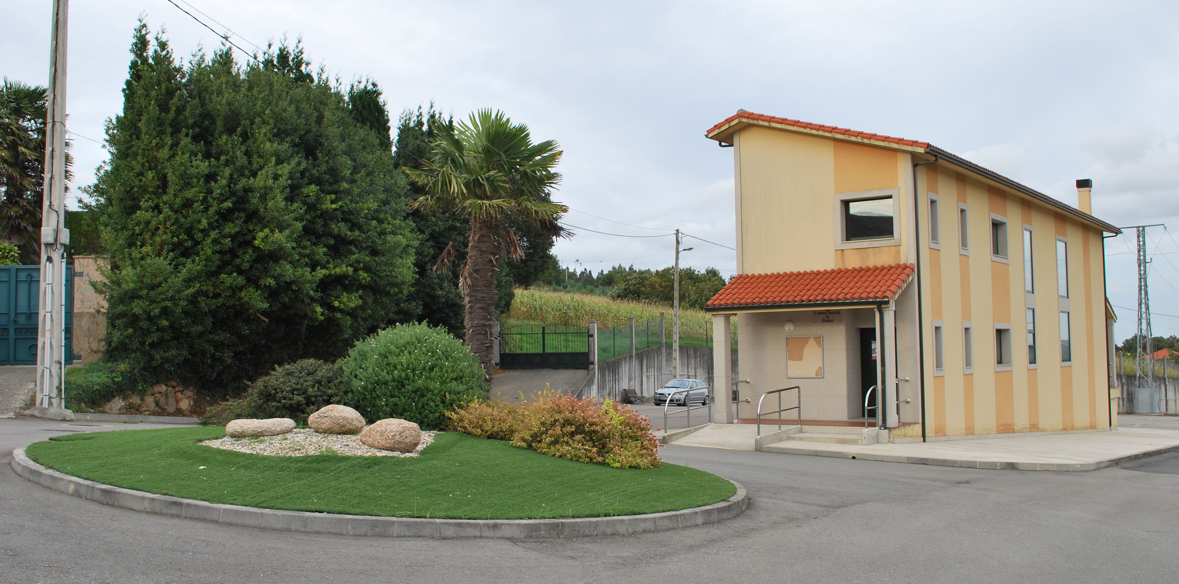 Local social de Castelo, Lañas Arteixo A Coruña Galiza Spain